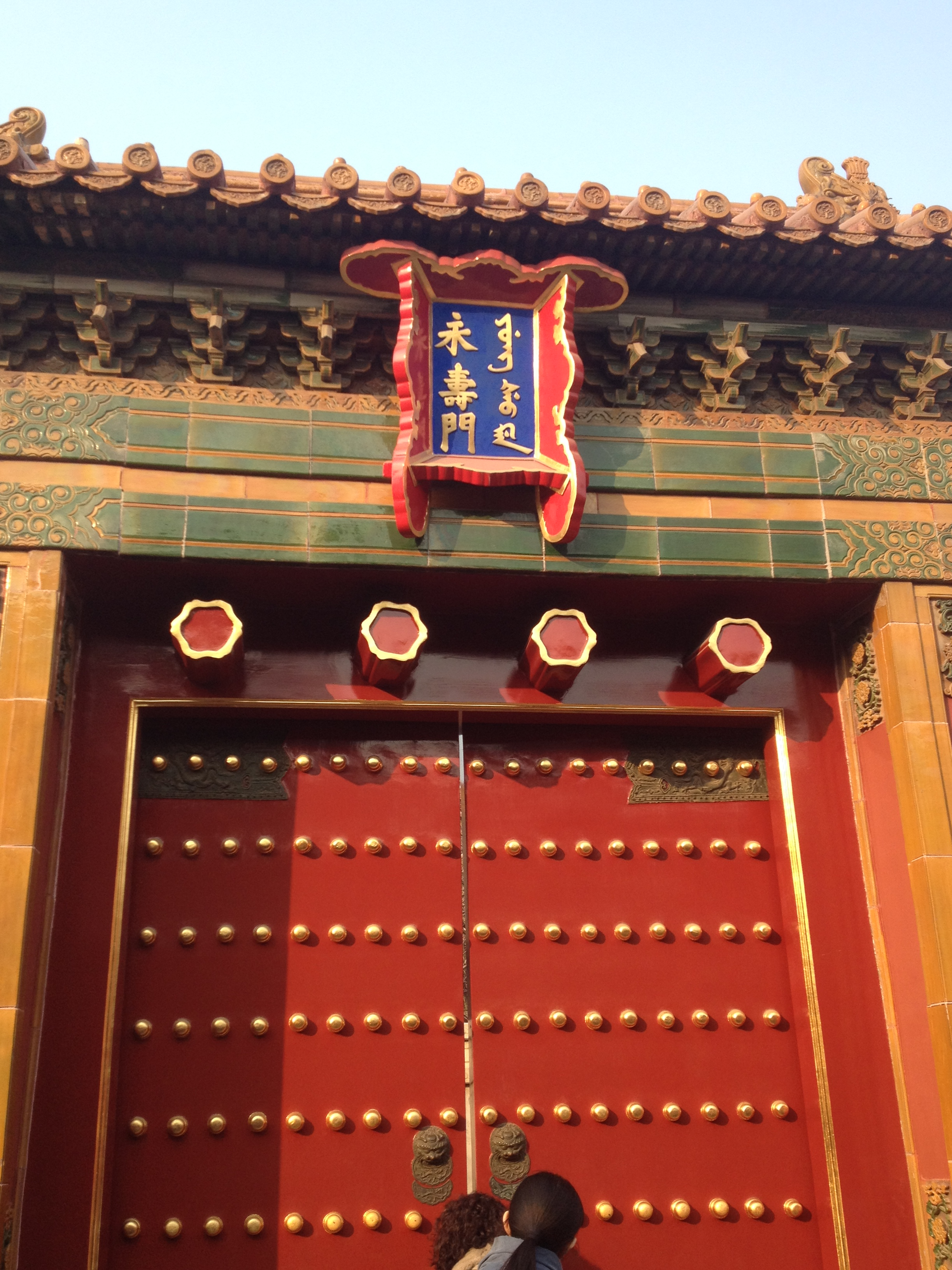 北京故宫中的永寿门